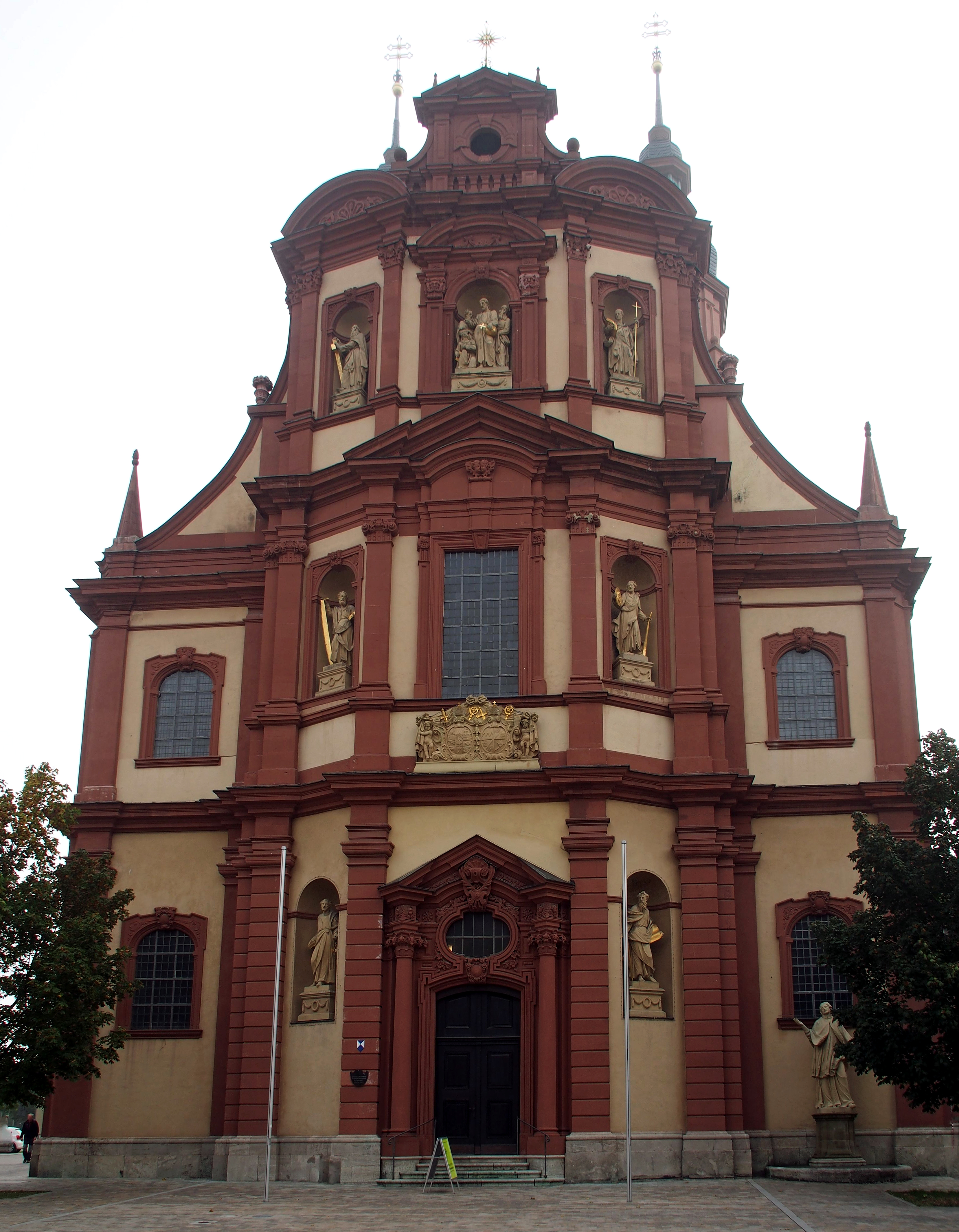 Pfarrkirche St. Peter , Würzburg